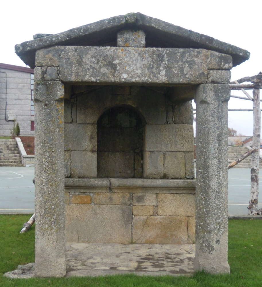 Peto de ánimas en Calvos (Calvos de Randín).